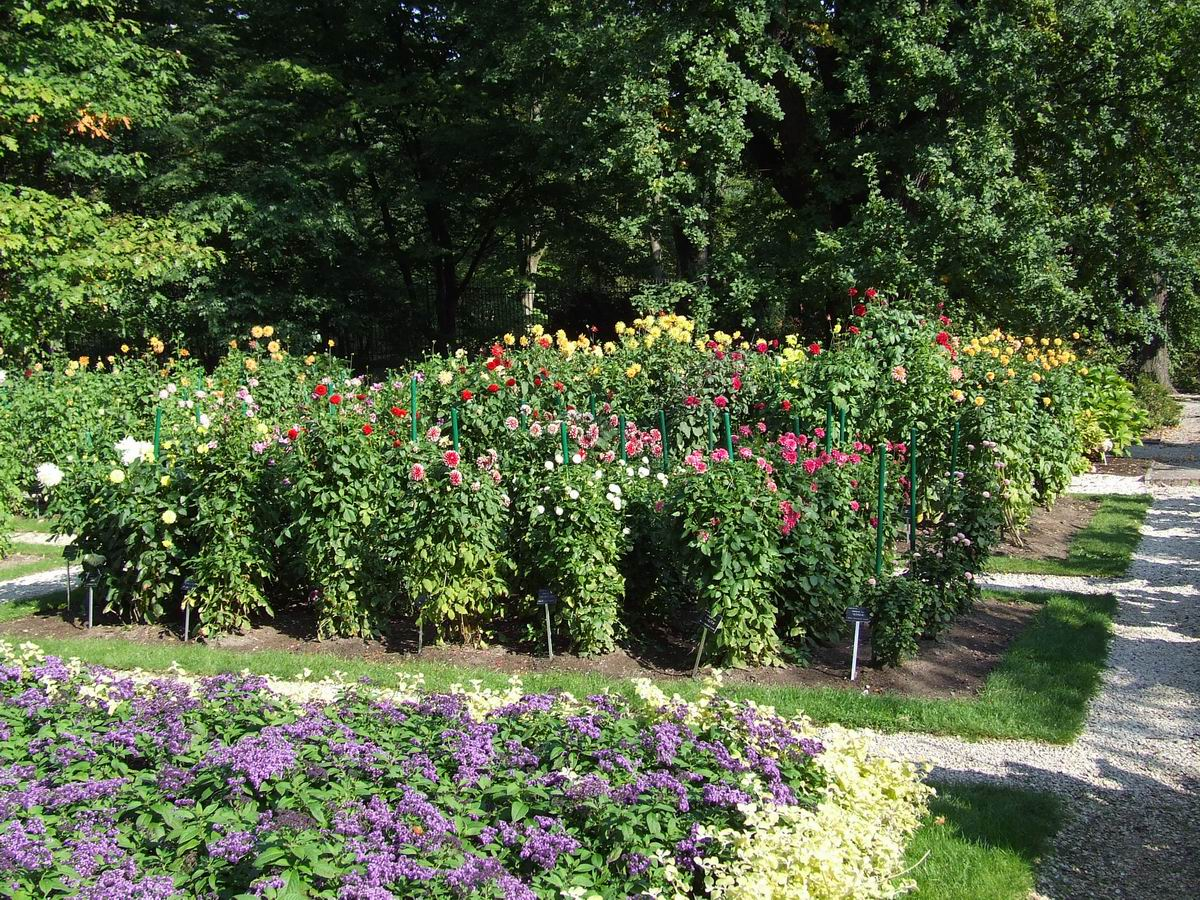 Dalie, Ogród Botaniczny UW w Warszawie